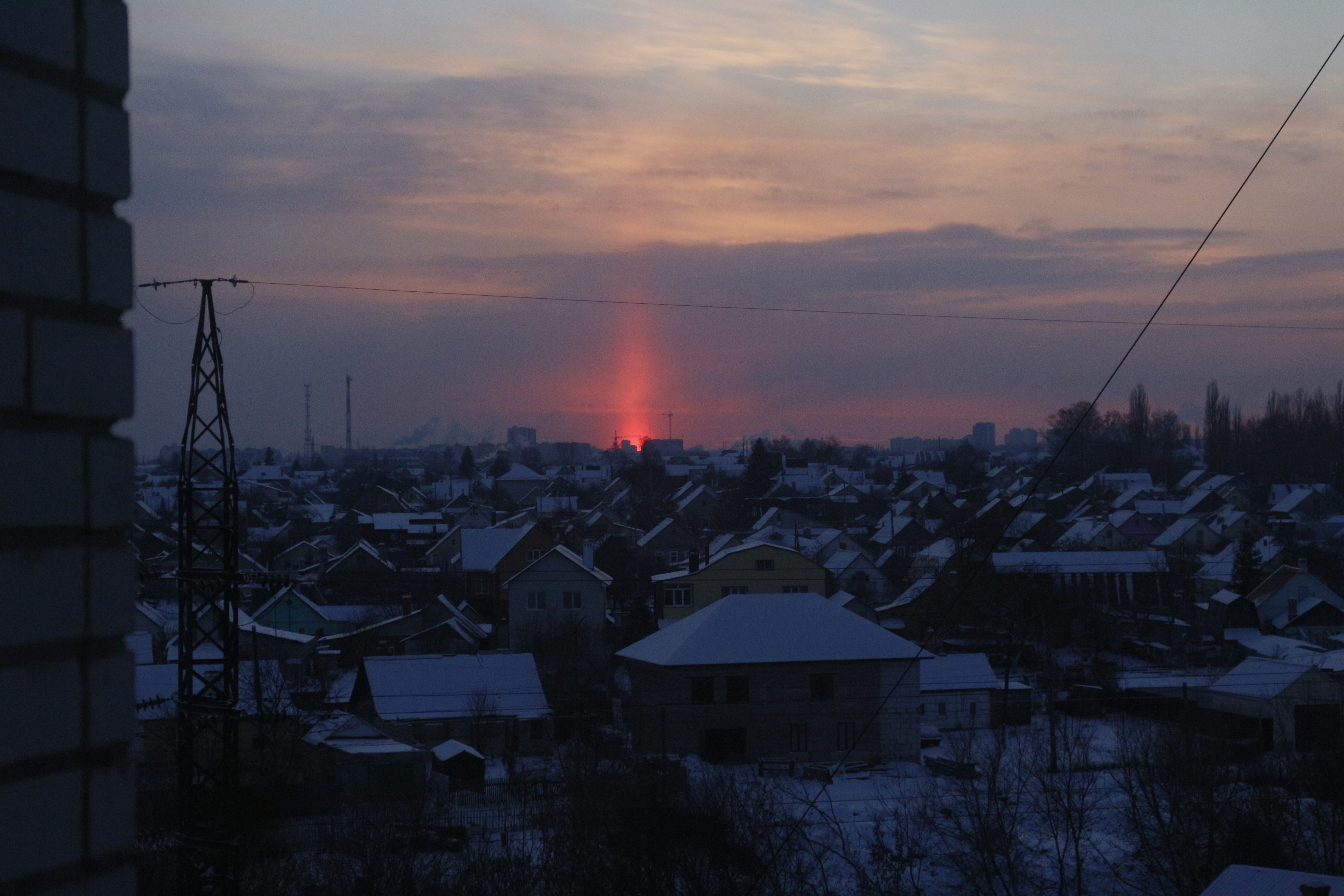 Солнечный столб в г. Липецк, Российская Федерация, 5 января 2016 года.